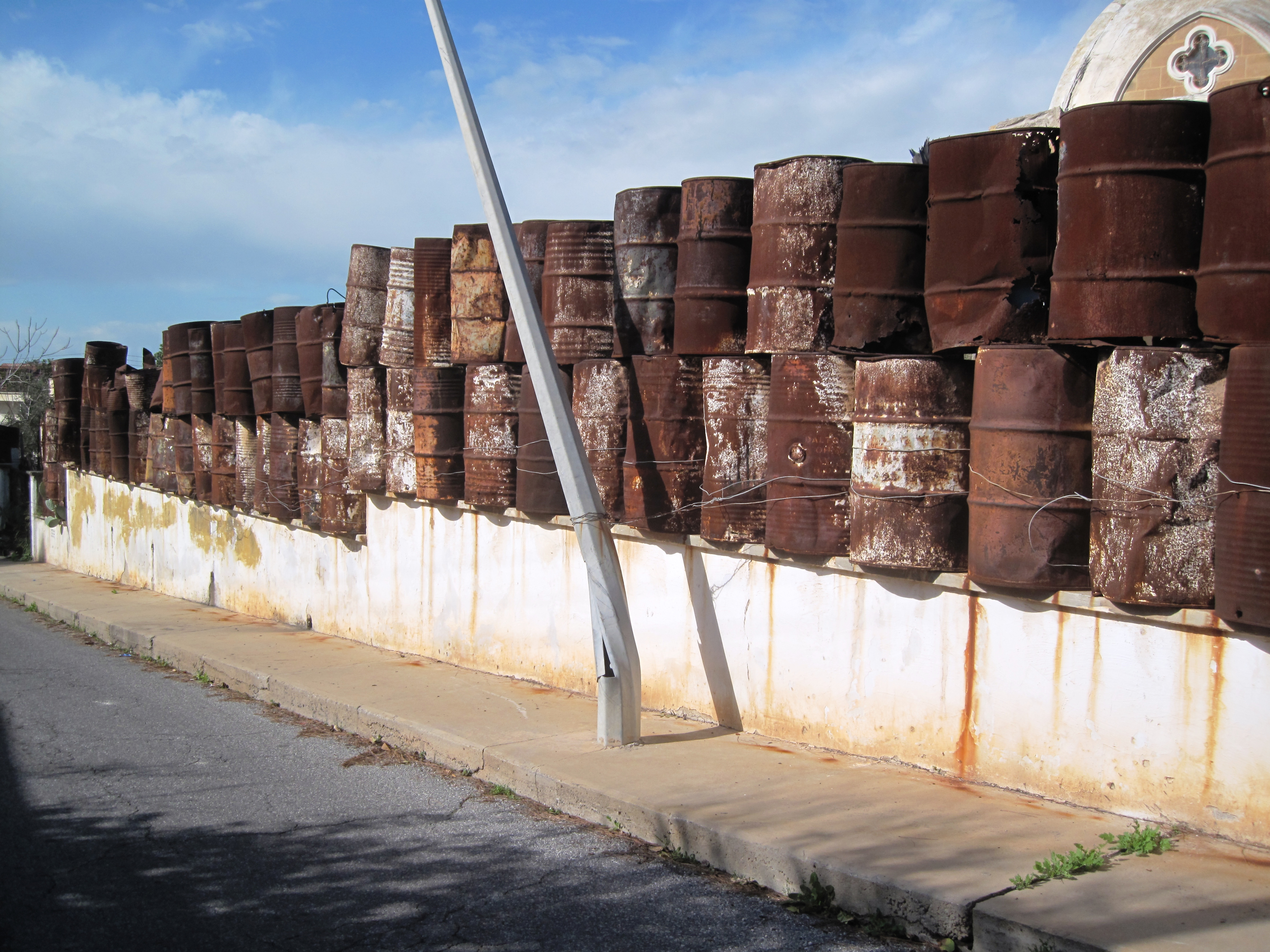 Varosha - Maras